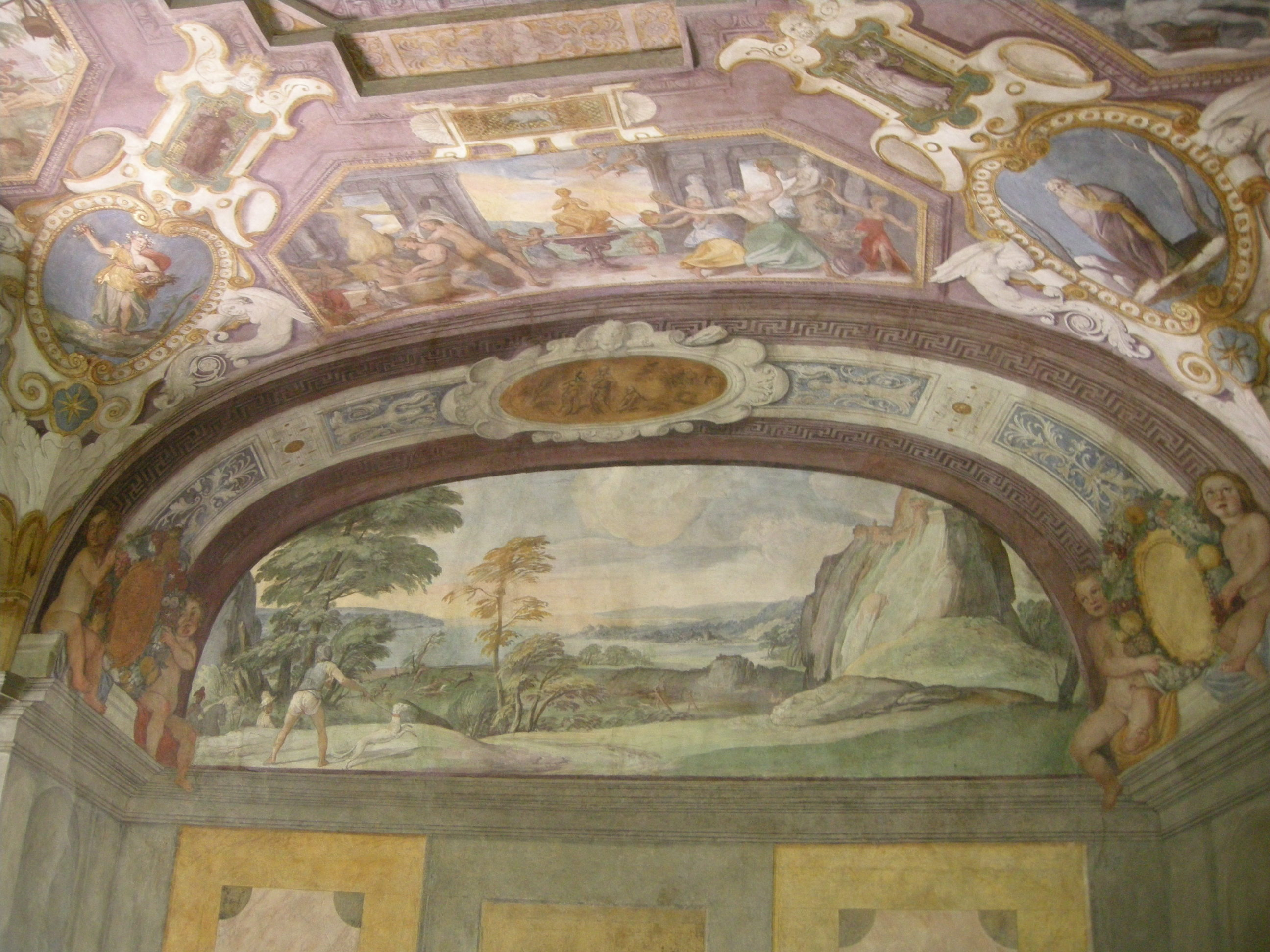 Palazzetto zuccari, affreschi di federico zuccari, lunetta dx